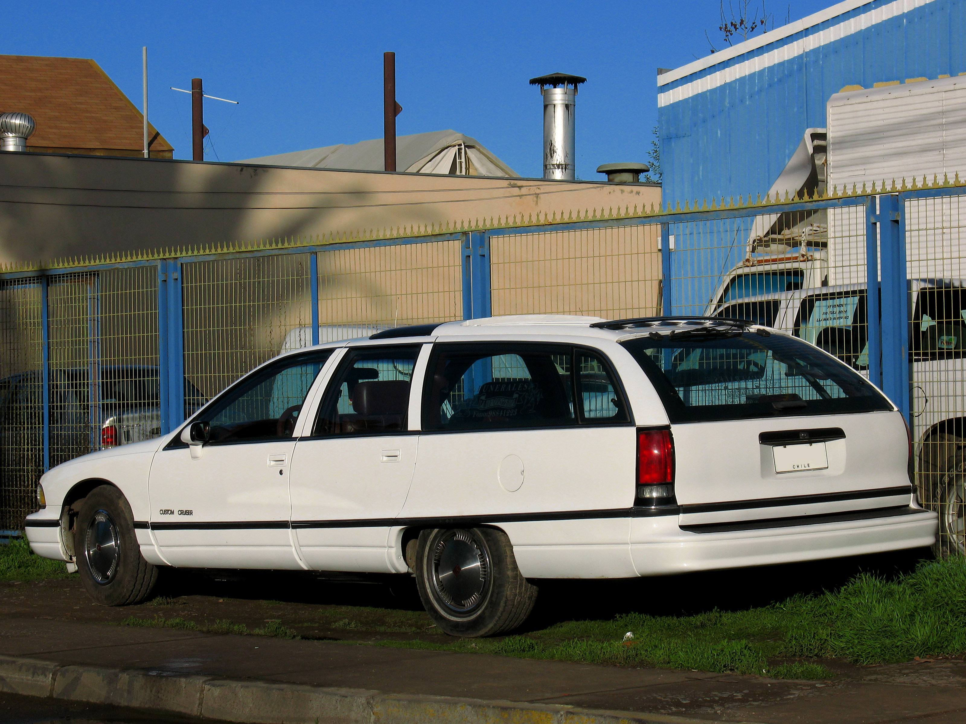 Oldsmobile Custom Cruiser 1992